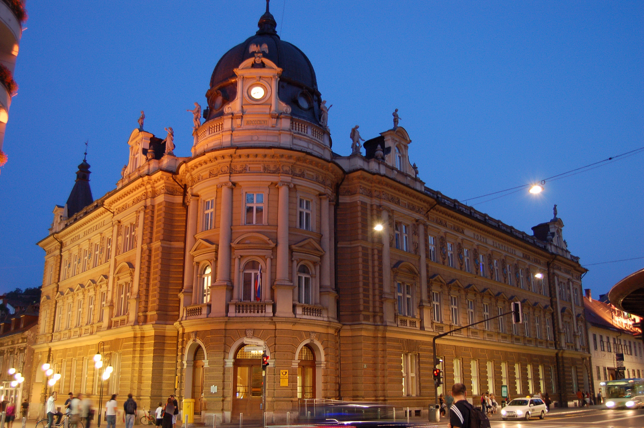 Slovenia - Ljubljana